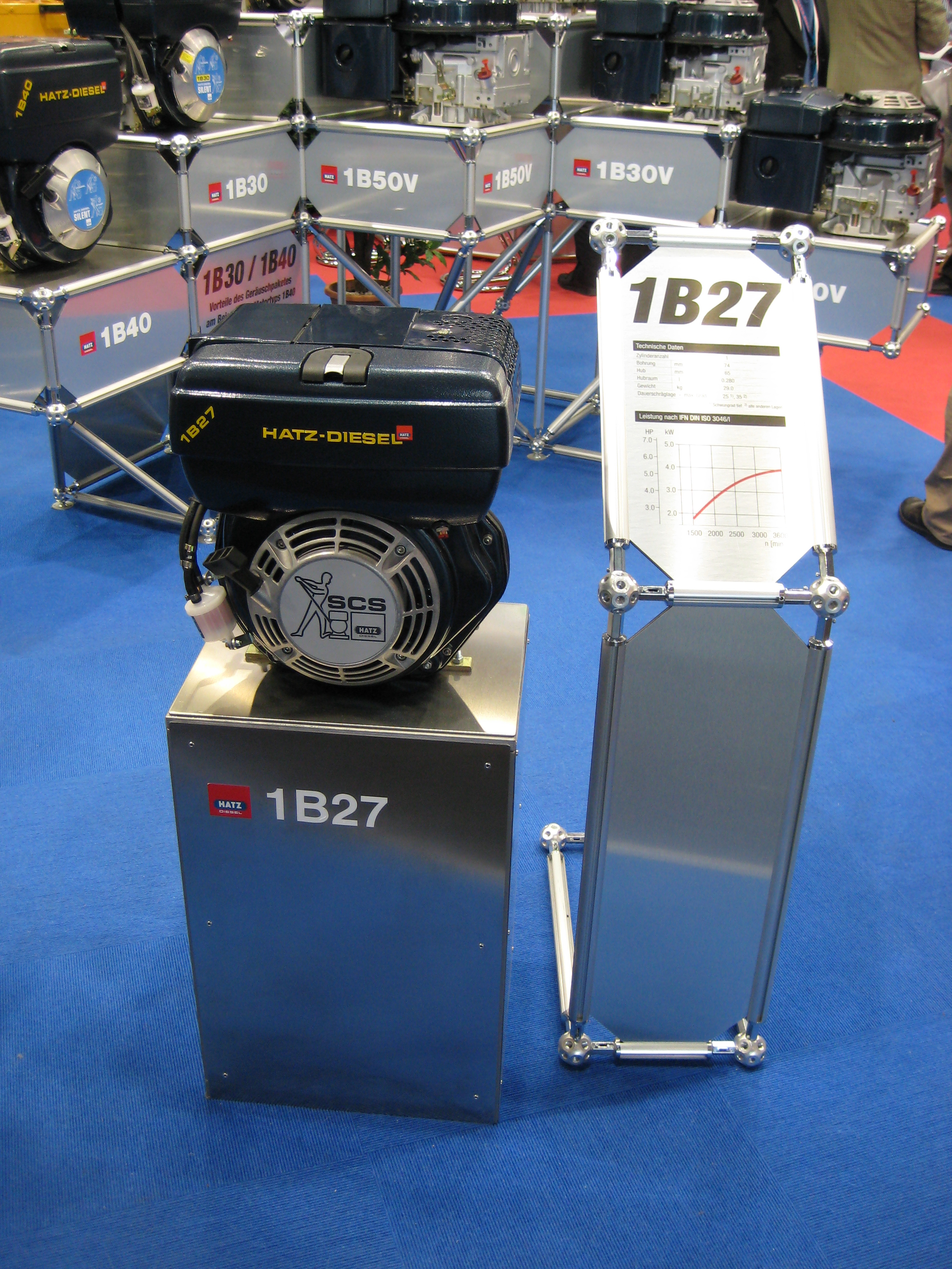 BAUMA 2007, Hatz Diesel 1B27